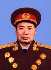 杨得志授衔照（2）